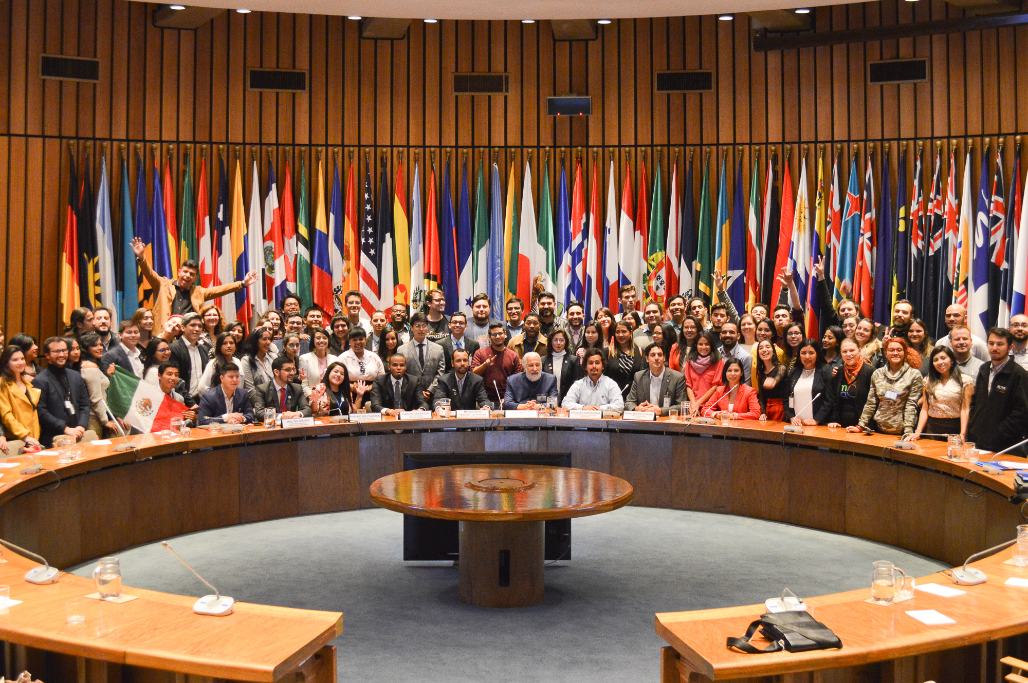 Foro de Juventudes ALC 2030 CEPAL